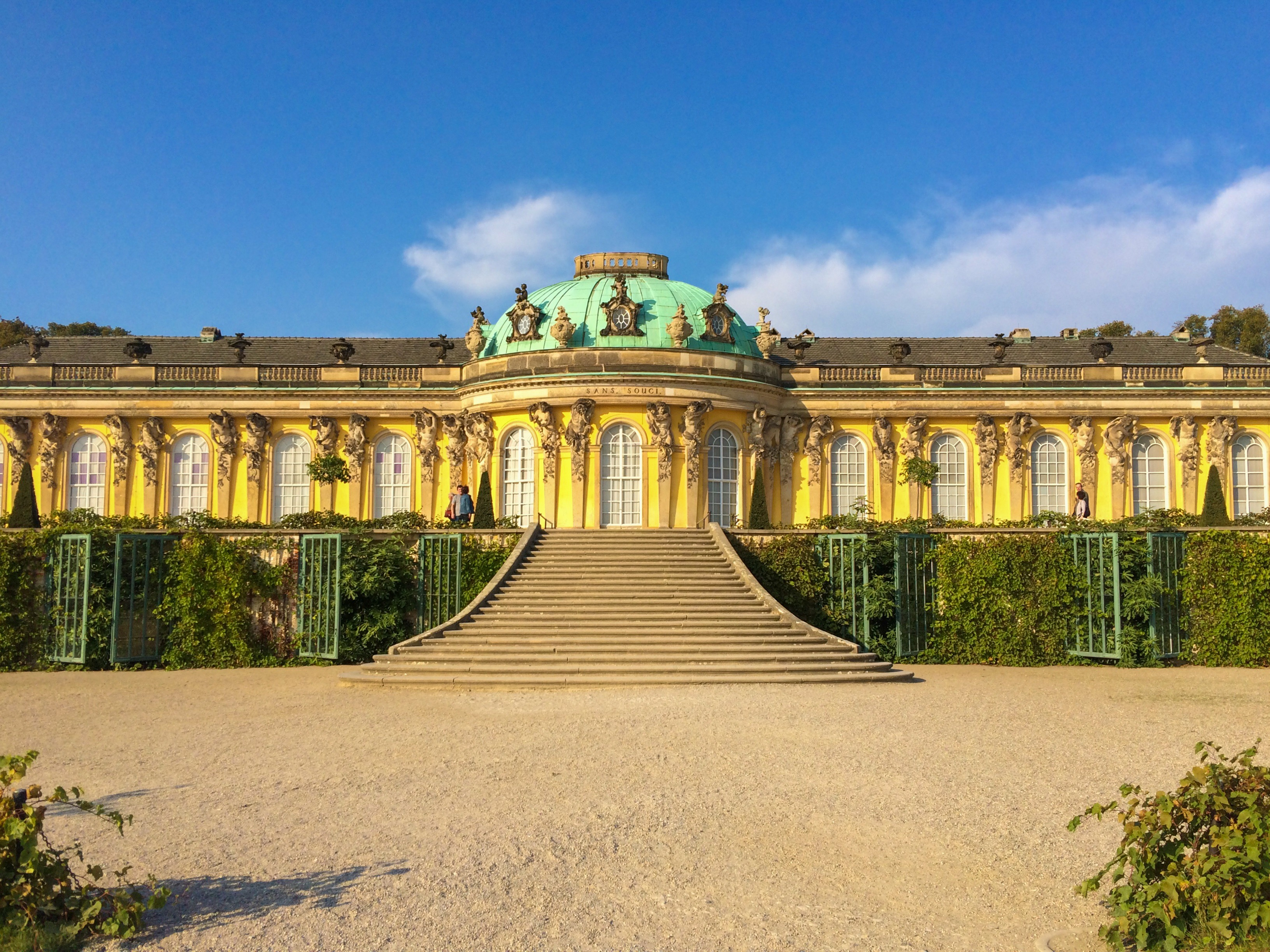 Schloss Sanssouci Potsdam Oktober 2014